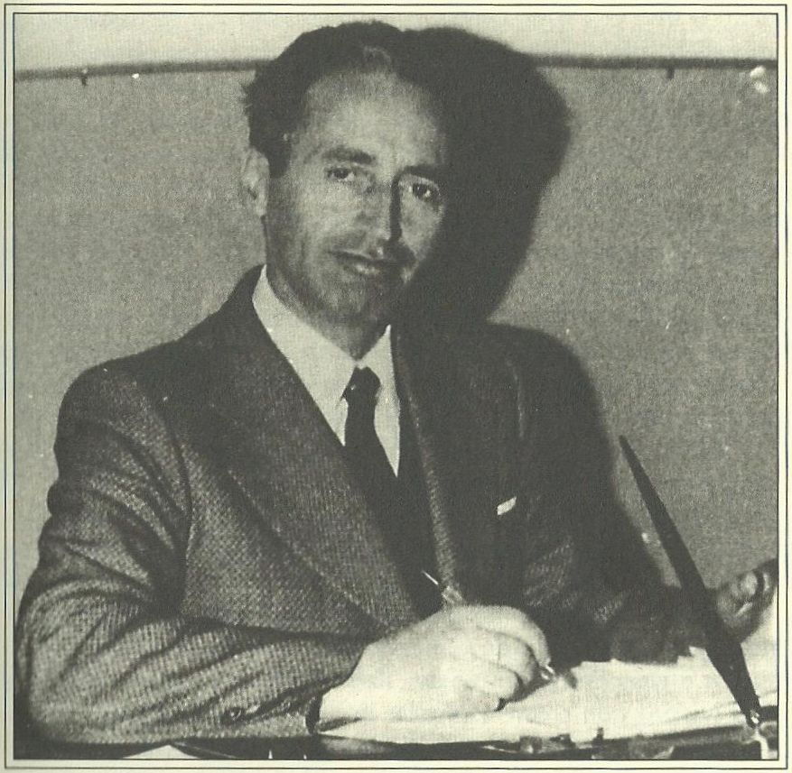 Giuseppe Stammati alla scrivania dello studio di casa